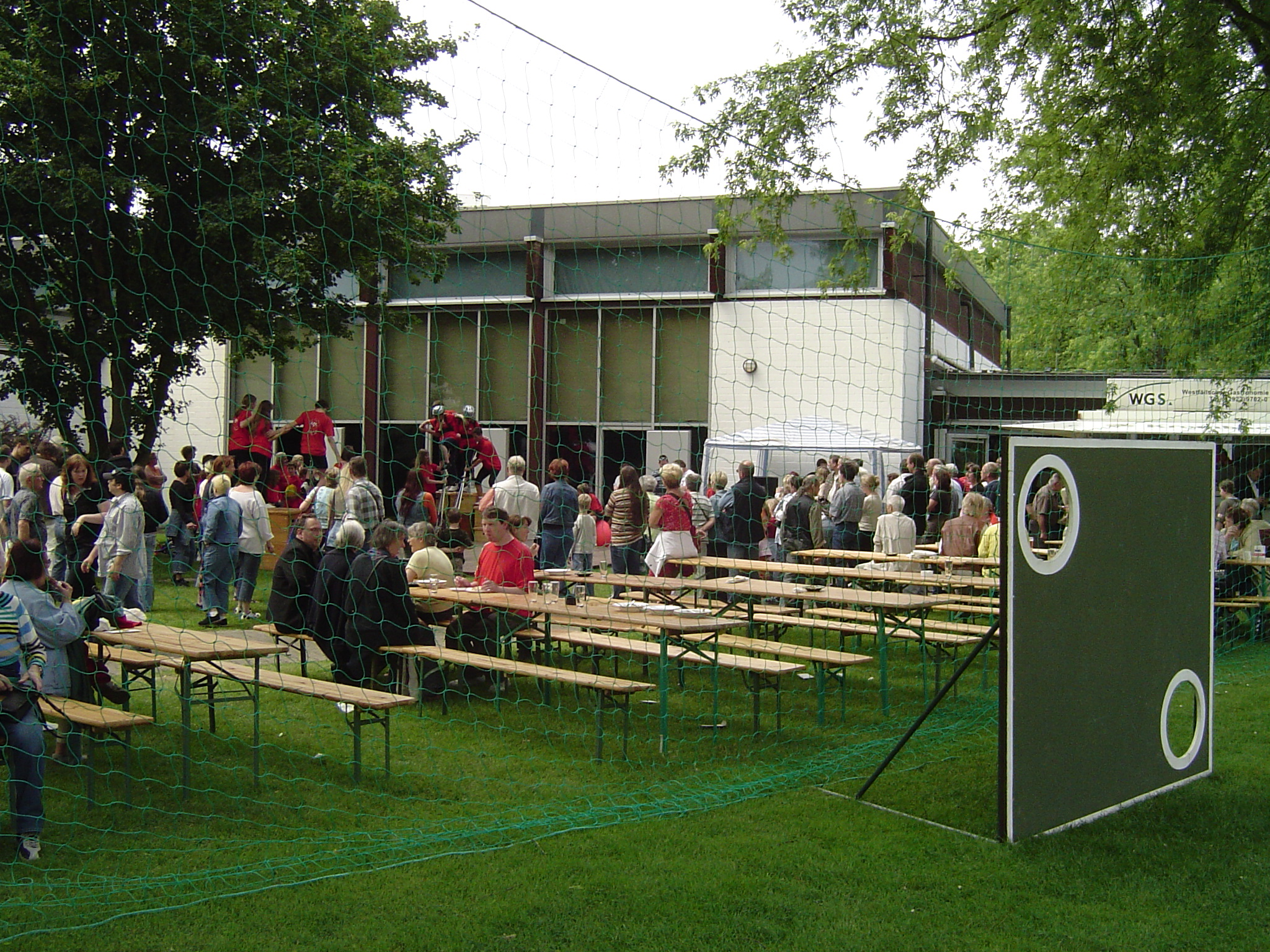 Sommerfest in de Westfälischen Klinik Dortmund